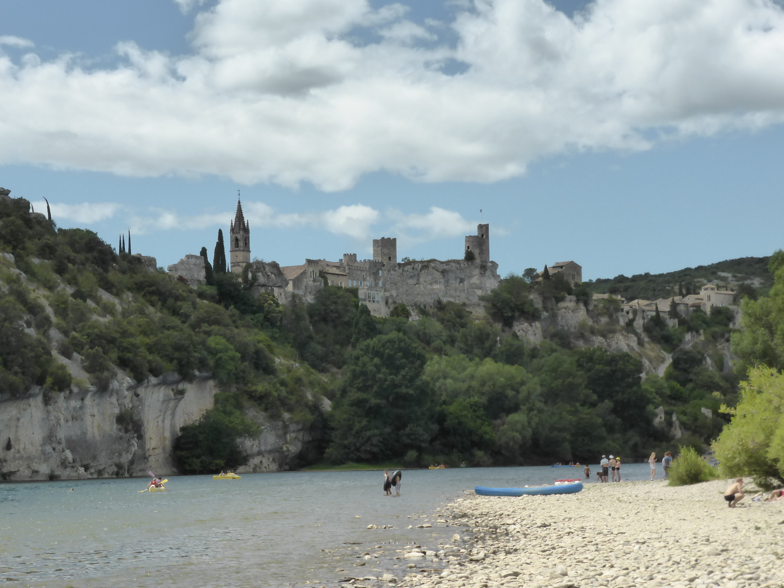 Vue du bourg d'Aiguèze et de la rivière Ardèche.